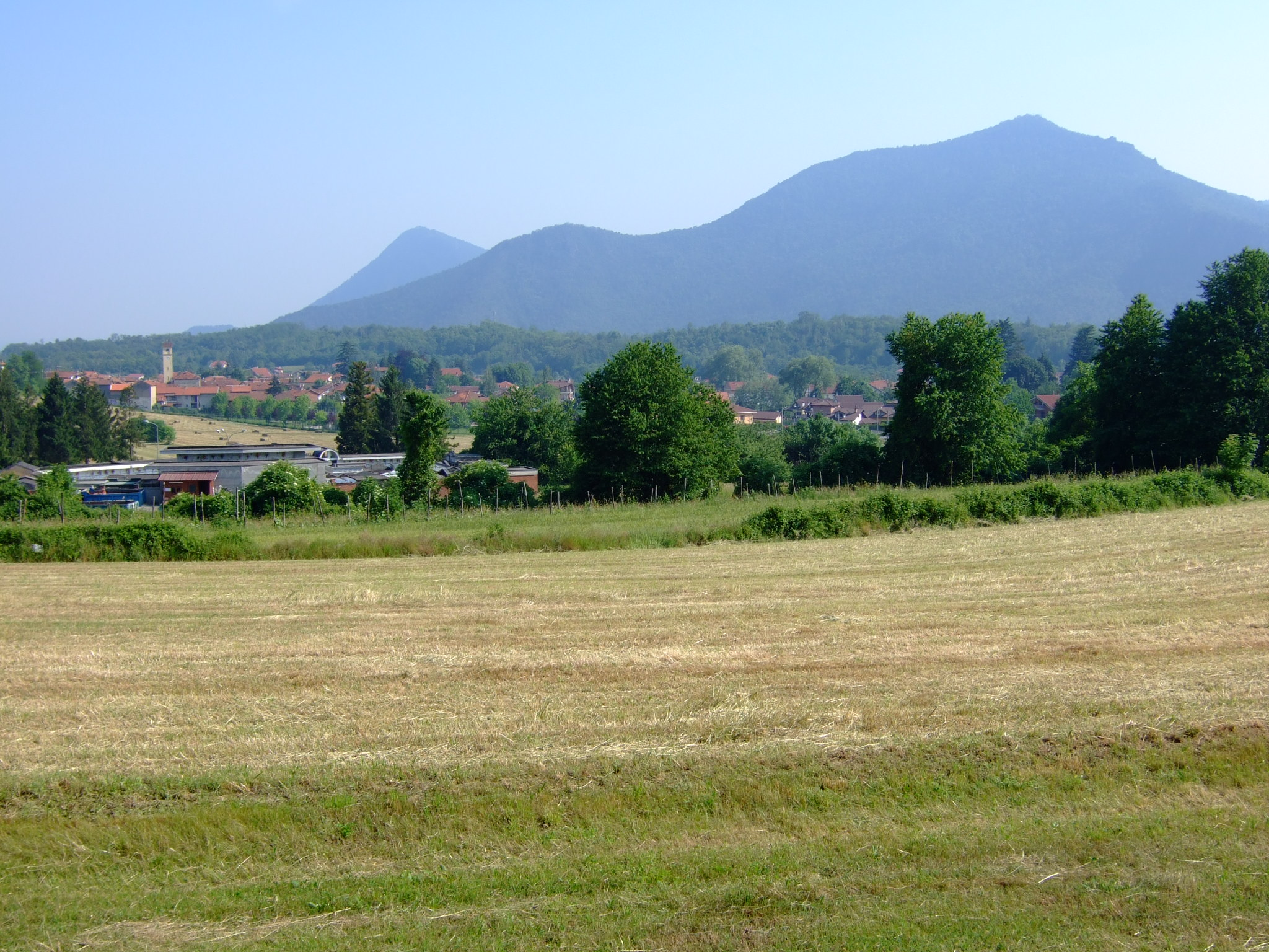 Le village de Reano, vu d'environ 1 km au nord; en arrière-plan les monts Pietraborga (droite) et San Giorgio (gauche)